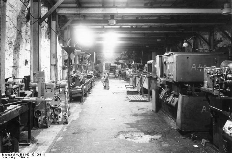 G 8501 A 205